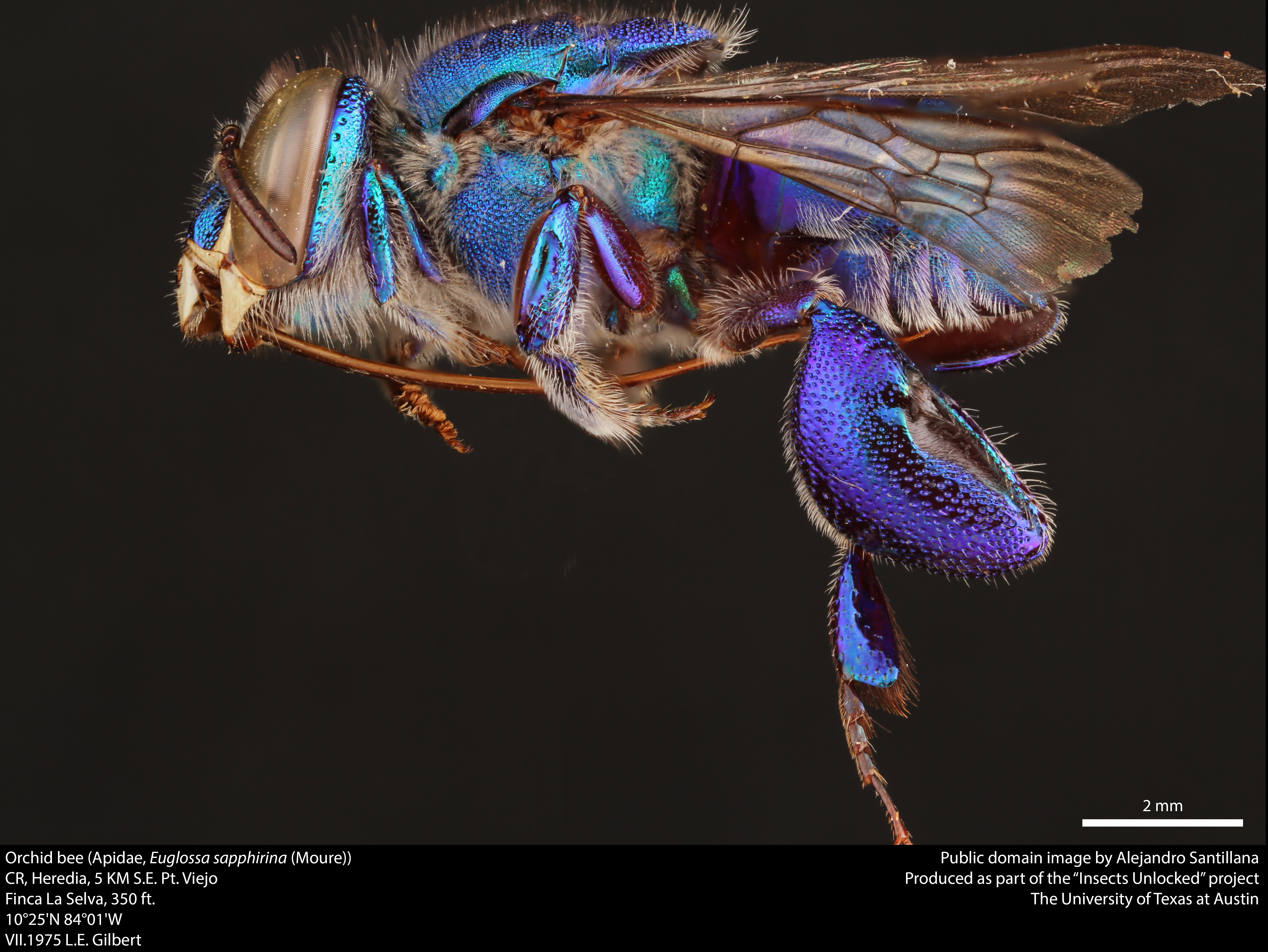 Orchid bee (Apidae, Euglossa sapphirina (Moure)) CR, Heredia, 5 KM S.E. Pt. Viejo Finca La Selva, 350 ft. 10°25'N 84°01'W VII.1975 L.E. Gilbert